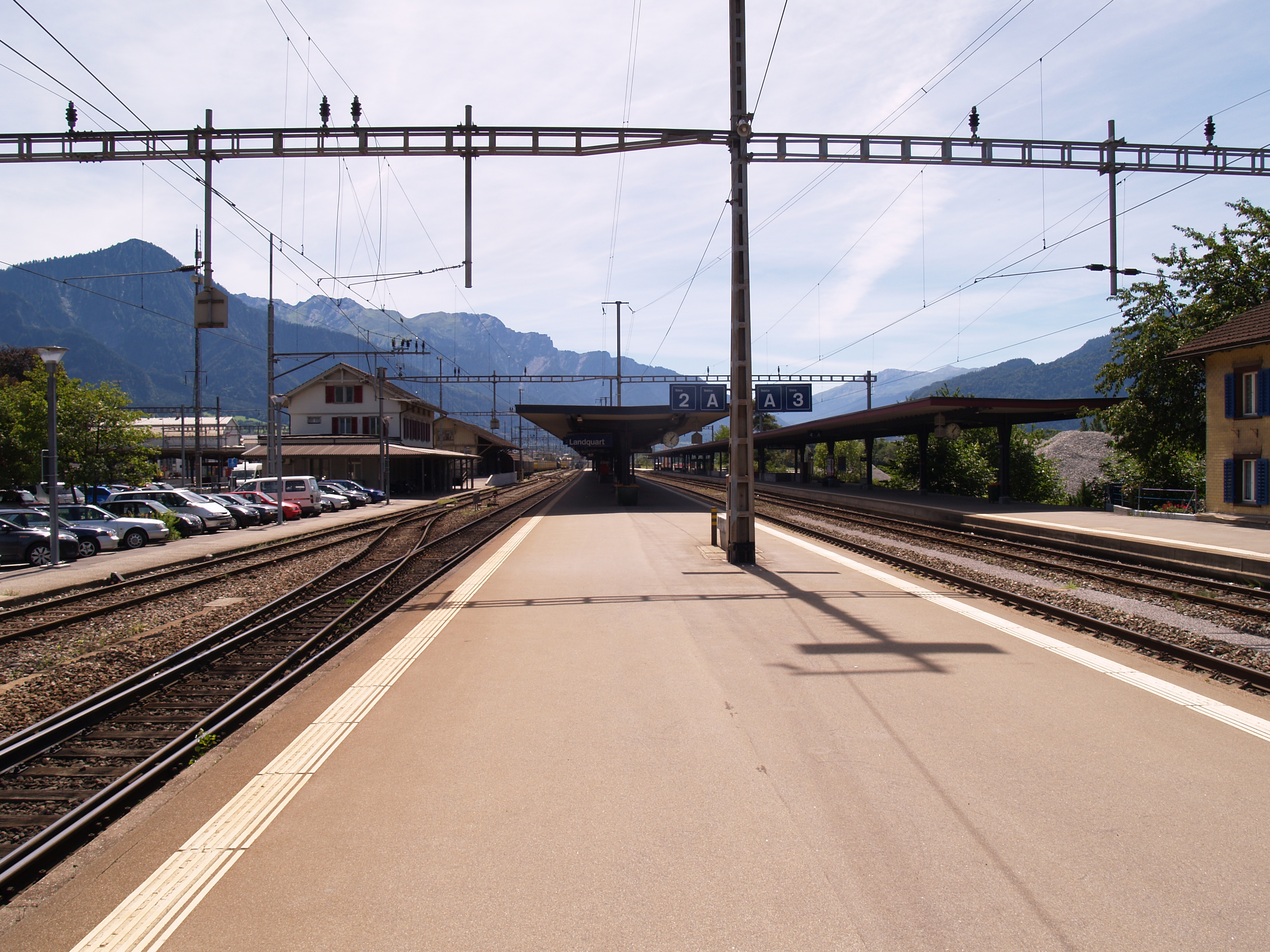 Die Gleis- und Publikumsanlage des SBB-Teils des Bahnhof Landquart (Sicht von Norden)